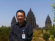 Duta Besar Rizali Indrakesuma di depan candi Prambanan (2011)